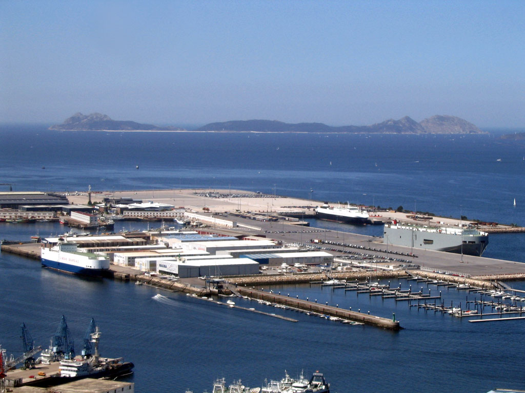 Vigo, porto coas illas Cíes ó fondo